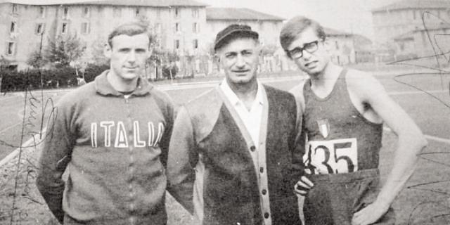 Da sinistra a destra: Ennio Preatoni, Alessandro Calvesi ed Eddy Ottoz.